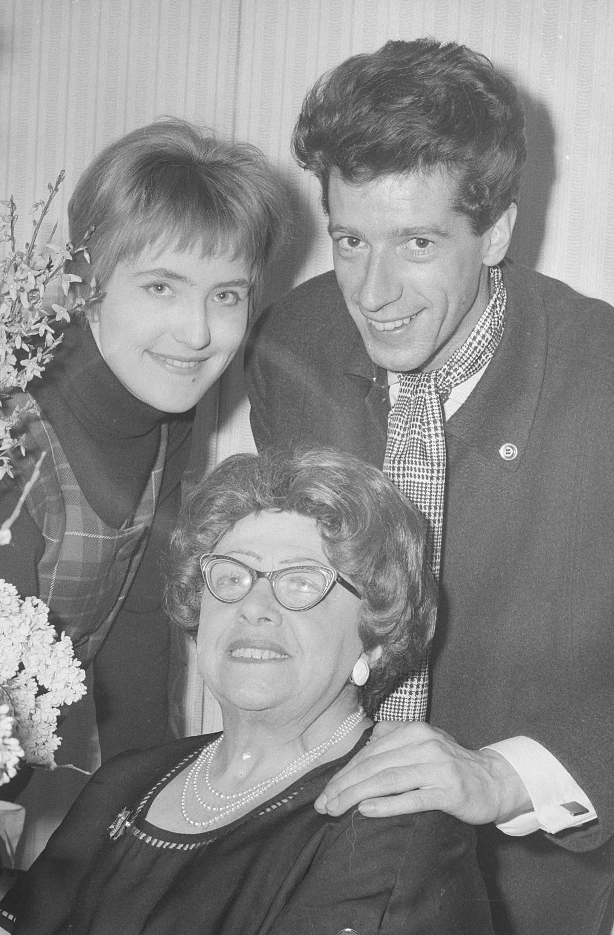 Collectie / Archief : Fotocollectie Anefo Reportage / Serie : [ onbekend ] Beschrijving : Heintje Davids 75 jaar. Heintje Davids, Jasperina de Jonge en Rudi Carrell Annotatie : Opdracht Telegraaf Datum : 11 februari 1963 Persoonsnaam : Carrell, Rudi, Davids, Heintje, Jong, Jasperina de Fotograaf : Nijs, Jac. de / Anefo Auteursrechthebbende : Nationaal Archief Materiaalsoort : Negatief (zwart/wit) Nummer archiefinventaris : bekijk toegang 2.24.01.03 Bestanddeelnummer : 914-8092